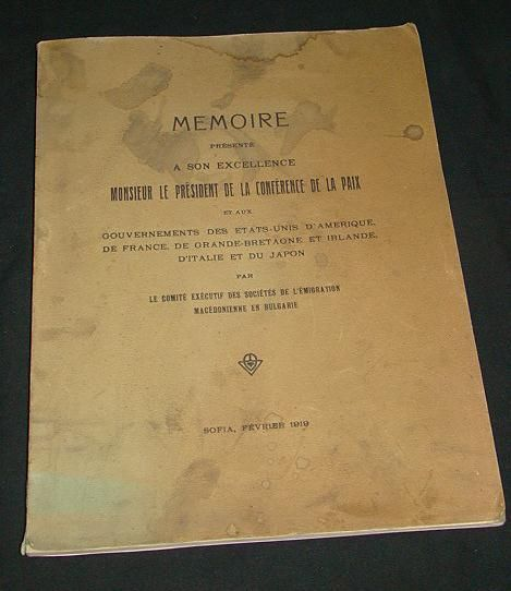 Mémoire Présenté a Son Excellence Monsieur le Président de la Conférence de Paix et aux Gouvernements des États-Unis d'Amérique, de France, de Grande-Bretagne et Irlande, d'Italie et du Japon par le Comité Executif des Sociétés de l'Emmigration Macédonienne en Bulgarie. Sofia, Février 1919.